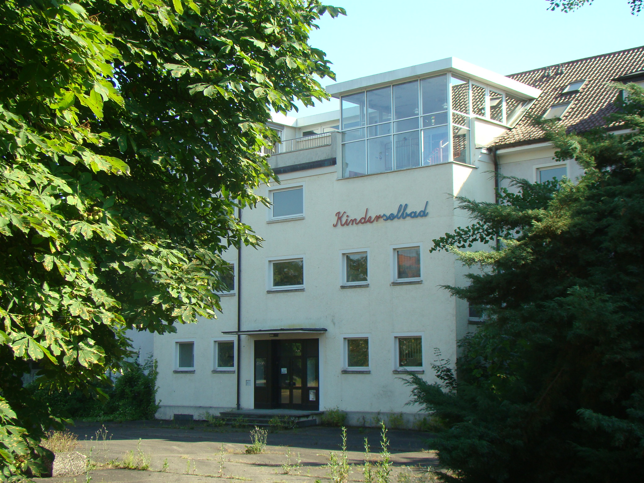 Kindersolbad Beathesda (Altbau) in Bad Friedrichshall-Jagstfeld